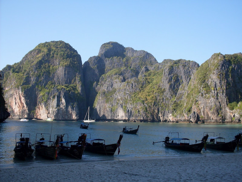 Ko Phi Phi Lee Adasi